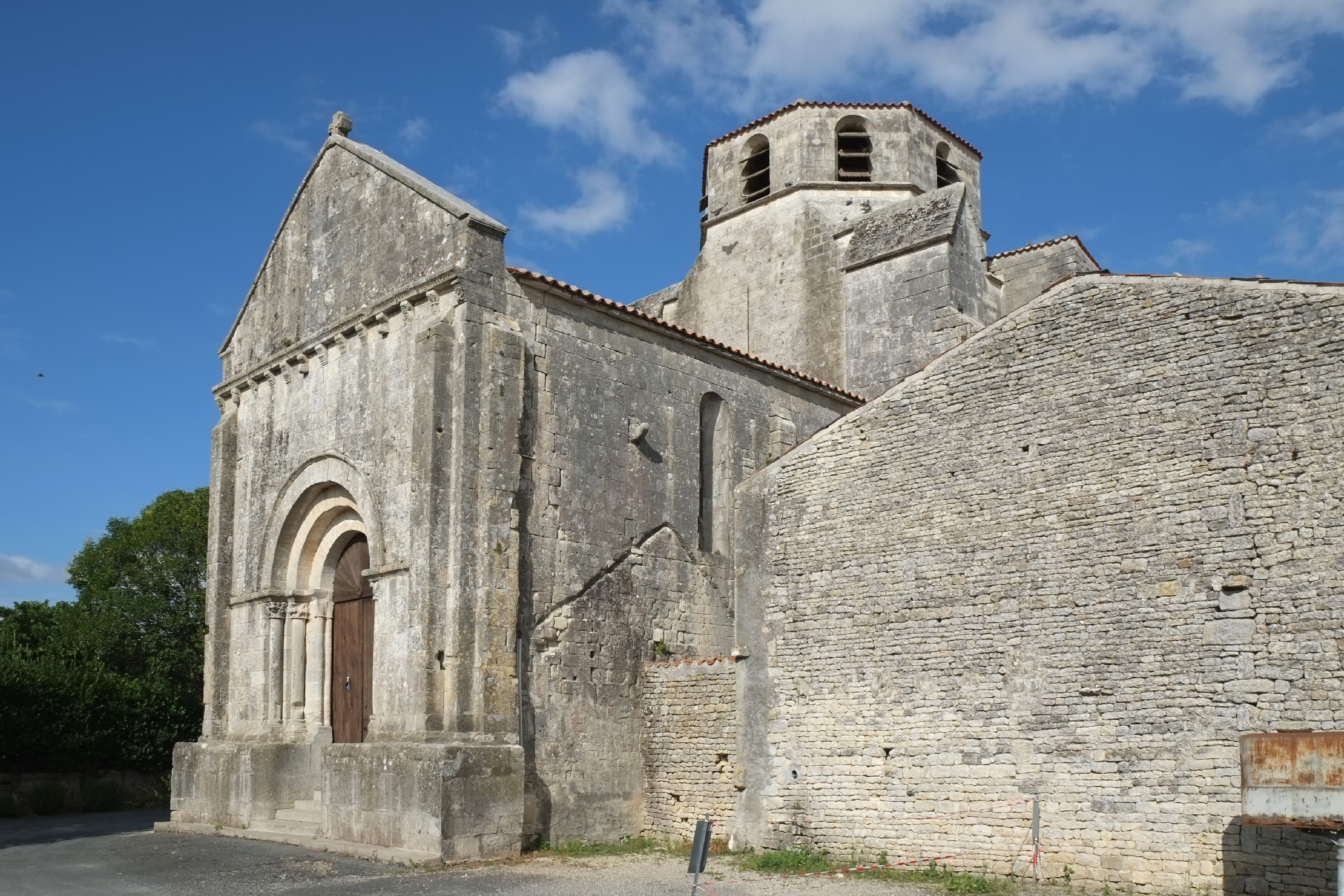 Église Saint-Étienne Sonnac Charente-Maritime France